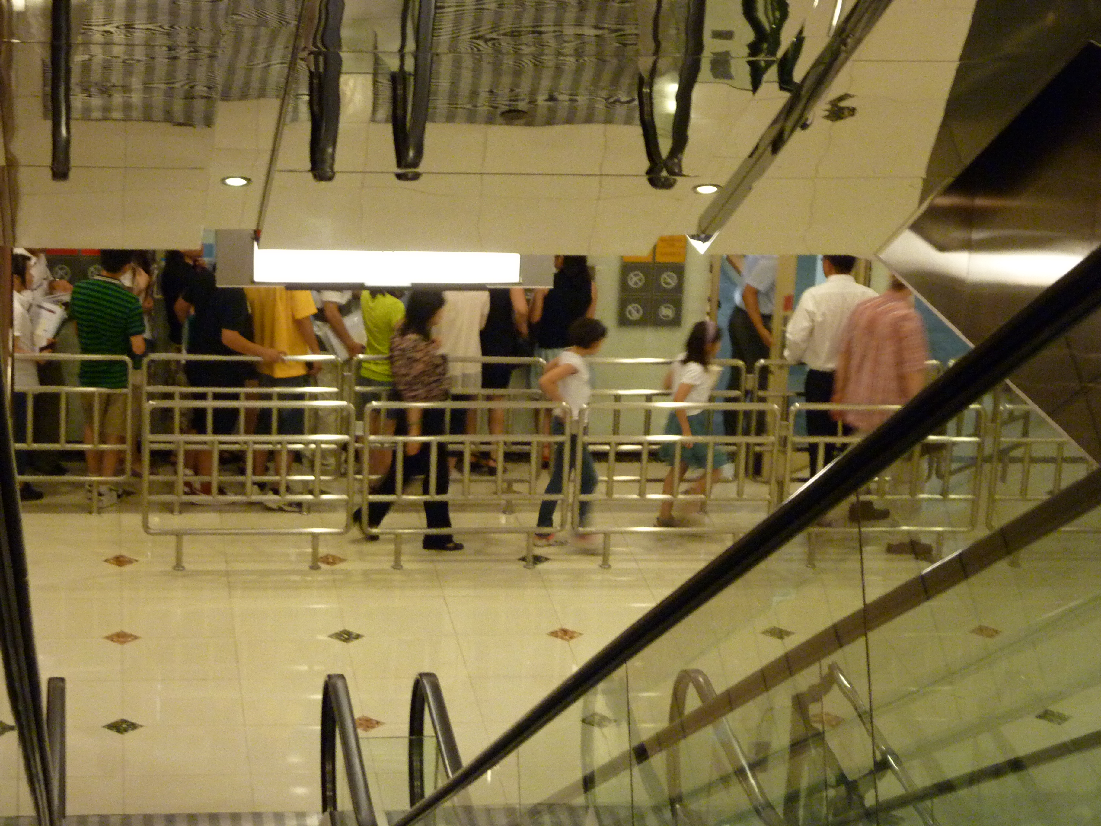 AMERICAN CITIZEN SERVICES/U.S.VISA SECTION 南京西路1038号梅龙镇商厦8层802